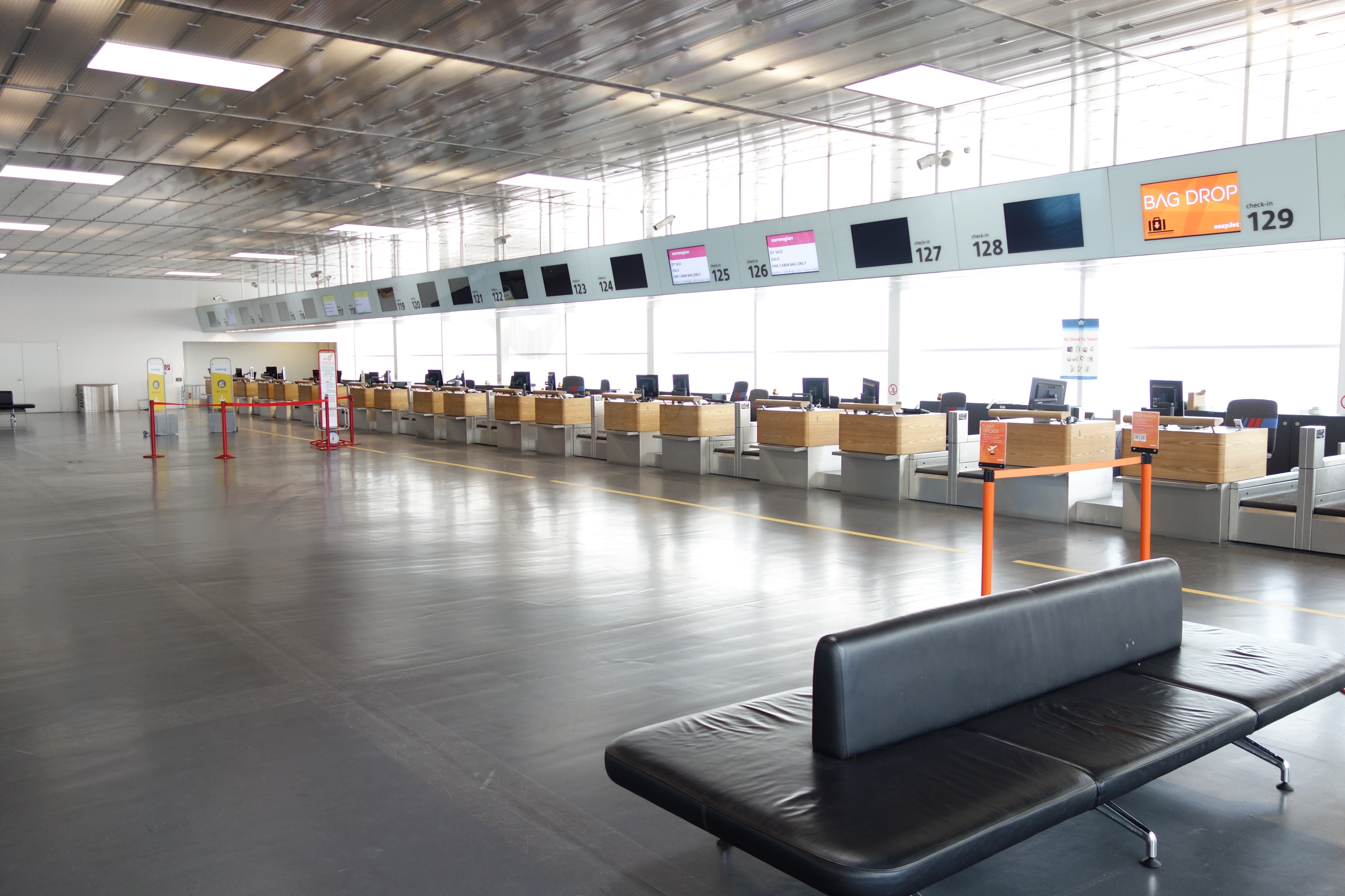 Innenansicht von Terminal 1A am Flughafen Wien um Juli 2014.